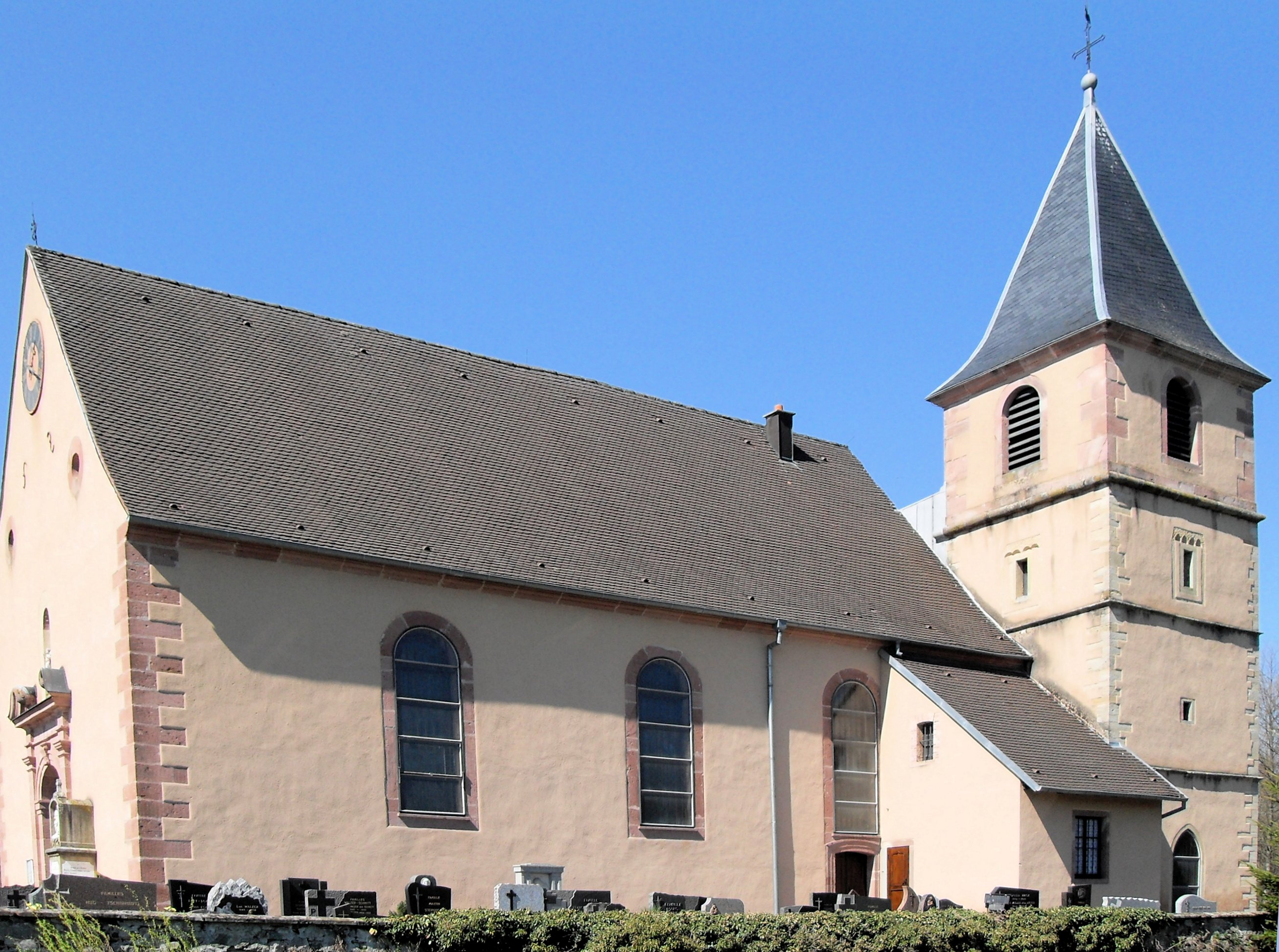 L'église Sainte-Marguerite à Soppe-le-Haut